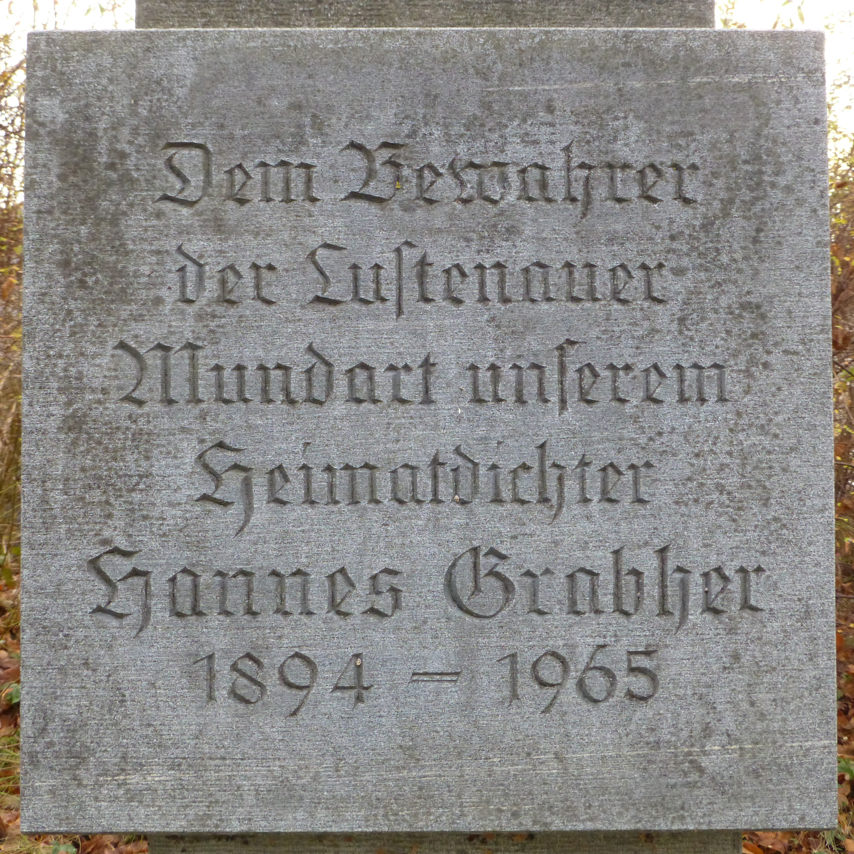 Detailaufnahme der Vorderseite